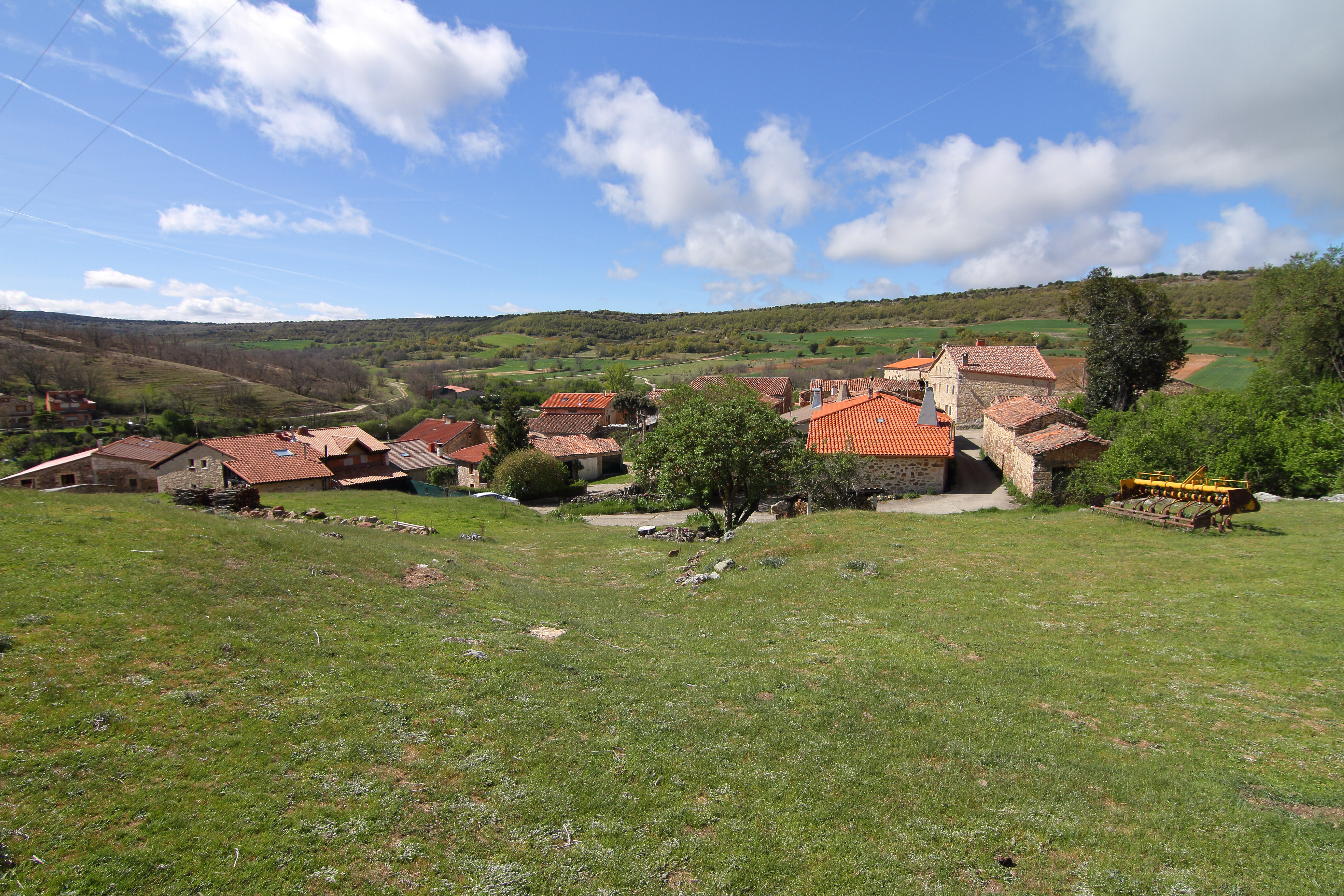 Torrelara, vista de la población desde la iglesia, 01